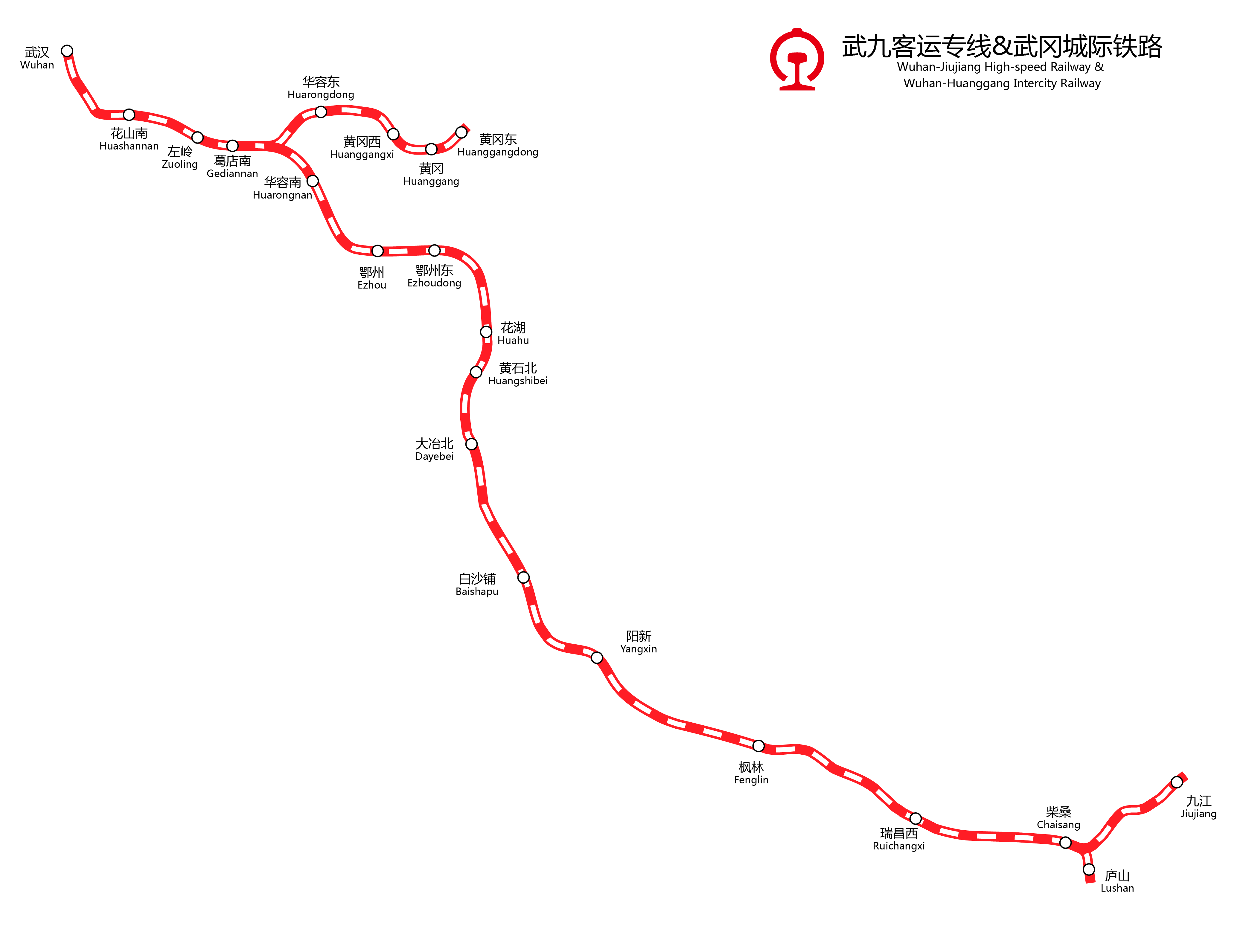 中文（中国大陆）: 武九客运专线和武冈城际铁路路线图